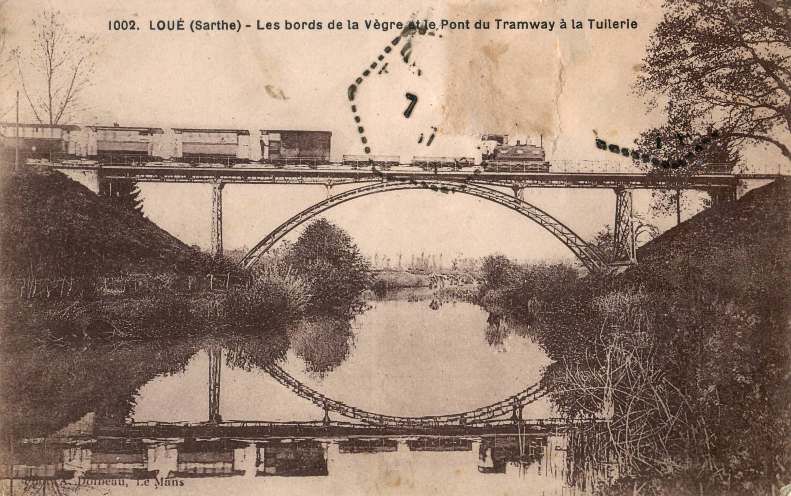 Carte postale ancienne éditée par A. Dolbeau au Mans :LOUÉ - Les abords de la Vègre et le Pont du Tramway